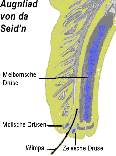 Augnliad von das Seitn